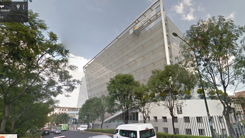 Oficina de Microsoft México